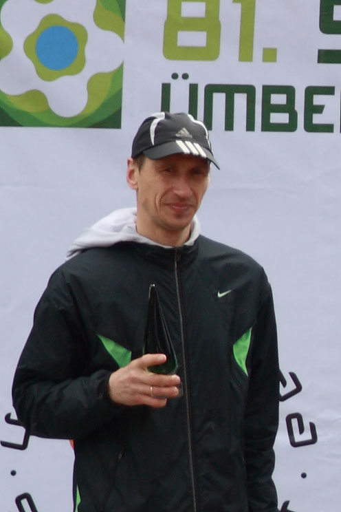 Vjatšeslav Košelev 2010. aasta Viljandi järvejooksu autasustamisel